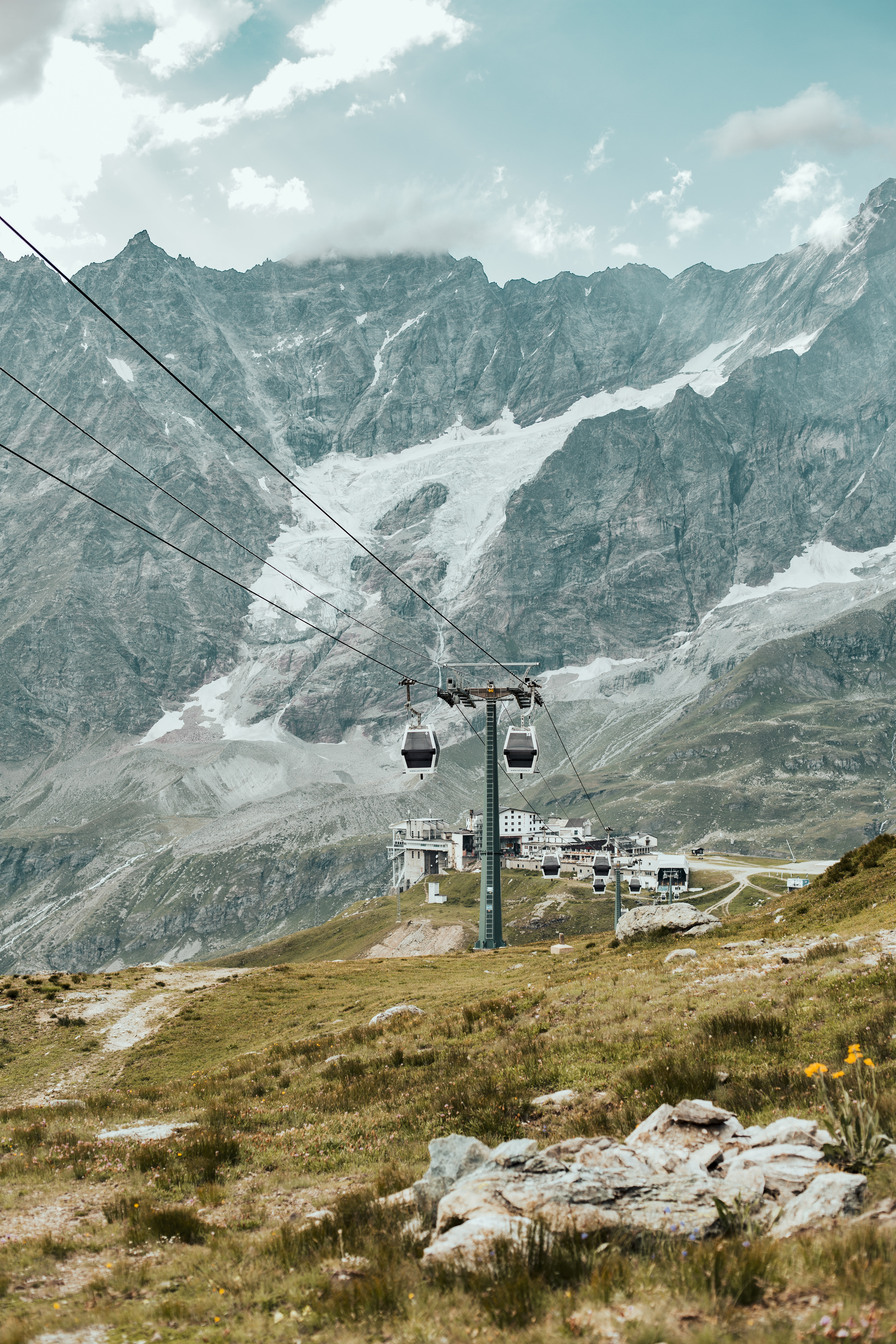 Blick auf Plan Maison und Seilbahn